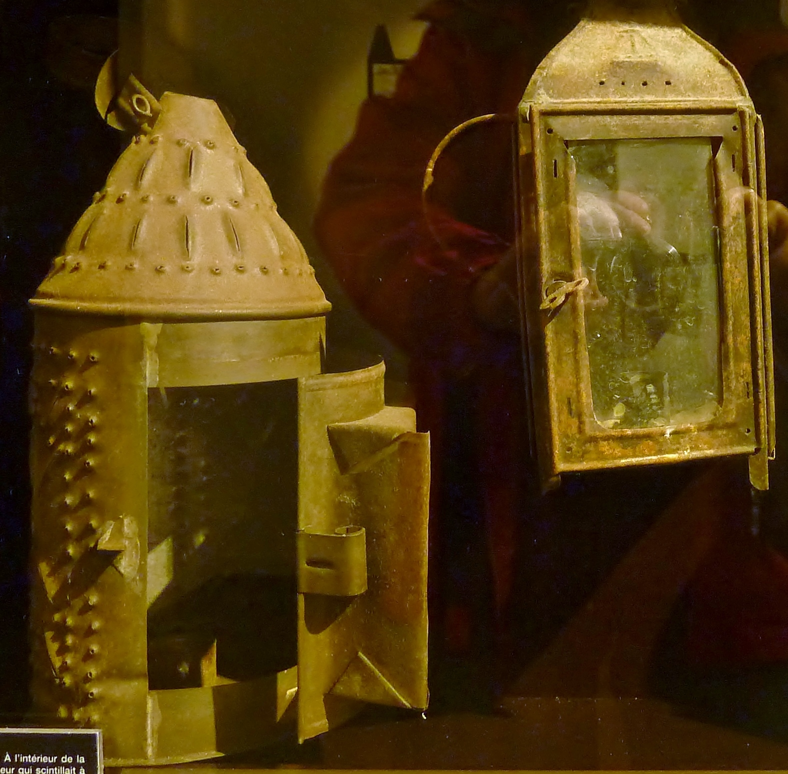 Lanternes à loup, en métal et datant du XIXe siècle ; à l'intérieur de la lanterne, on allumait une chandelle et les lueurs qui scintillaient à travers les trous percés dans la tôle effrayait les loups (Musée du loup, Le Cloïtre-Saint-Thégonnec).